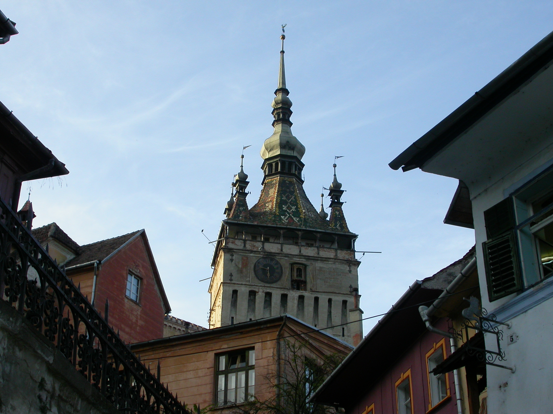 Ansamblu fortificații, sec. XIV - XVIII